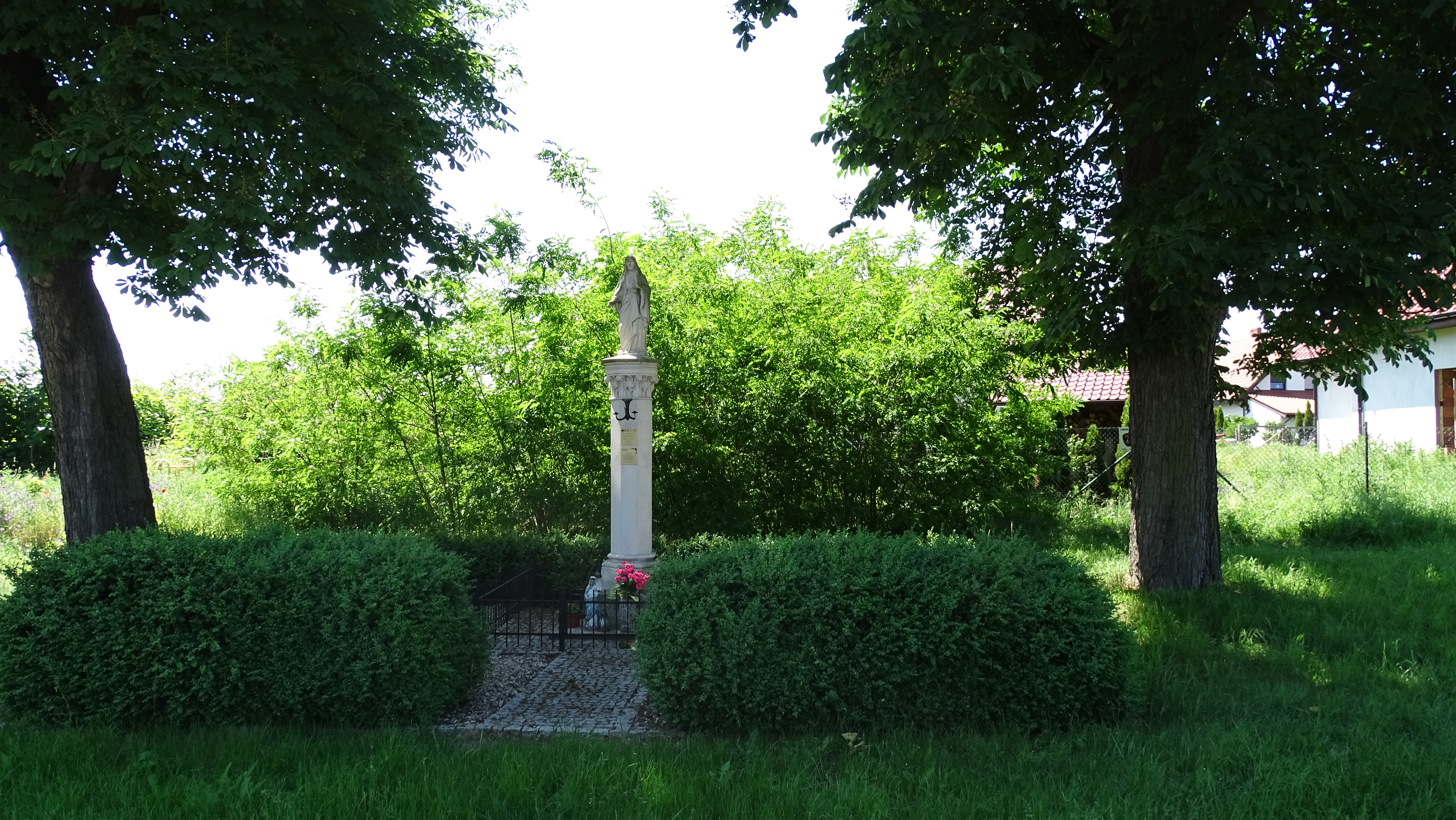 Psarskie, Śrem County, Poland. One of a three roadside shrines there.